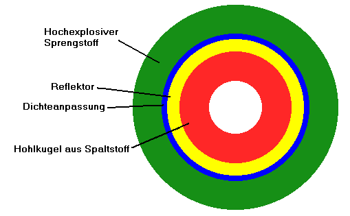 Implosionsbombe